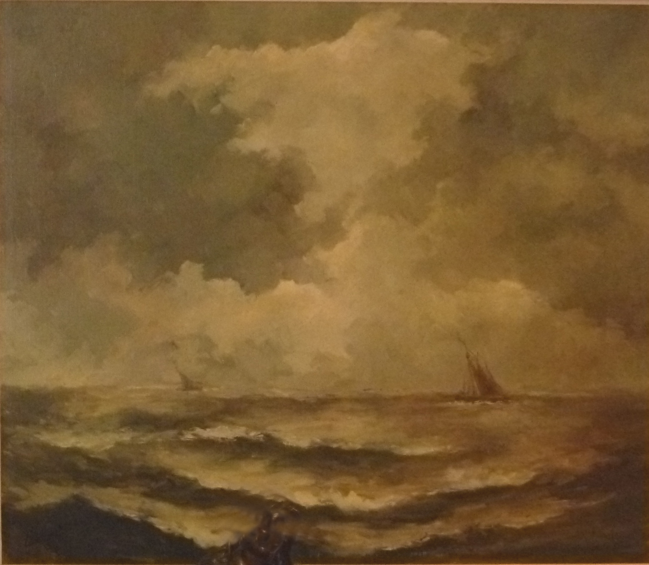 "Marine met Knokse koffers", olieverf op doek (80 x 100 cm) door de Belgische kunstschilder Léon Philippet (1843-1906); privébezit